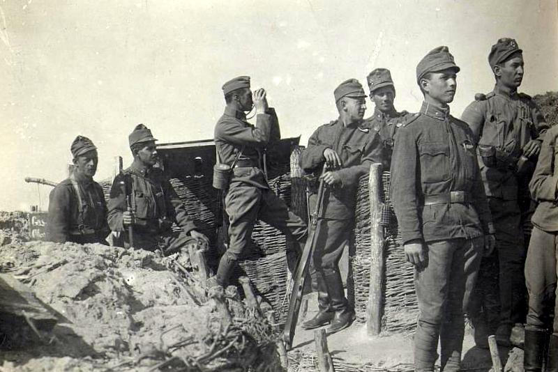 Feldwache 9 beim Infanterieregiment 49 in Wielick